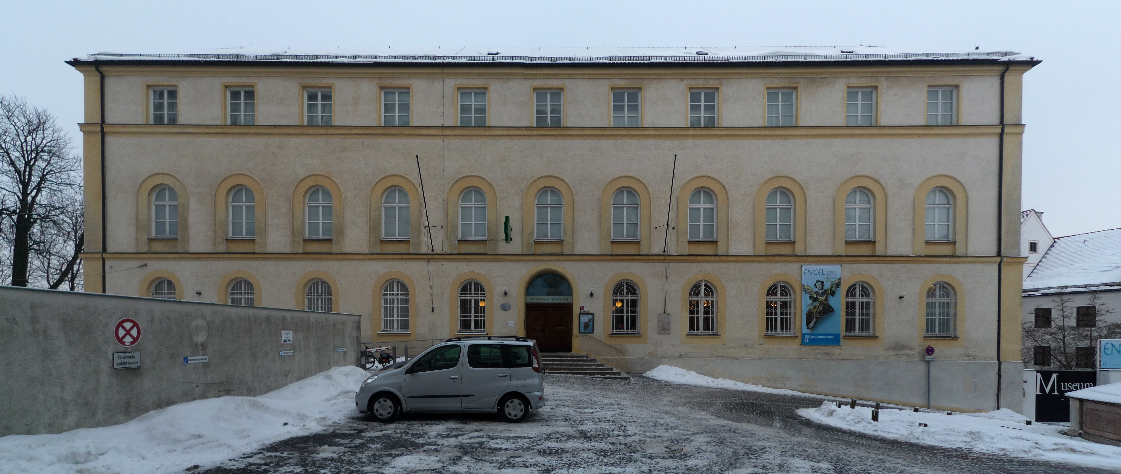 Domberg 21 in Freising; Diözesanmuseum